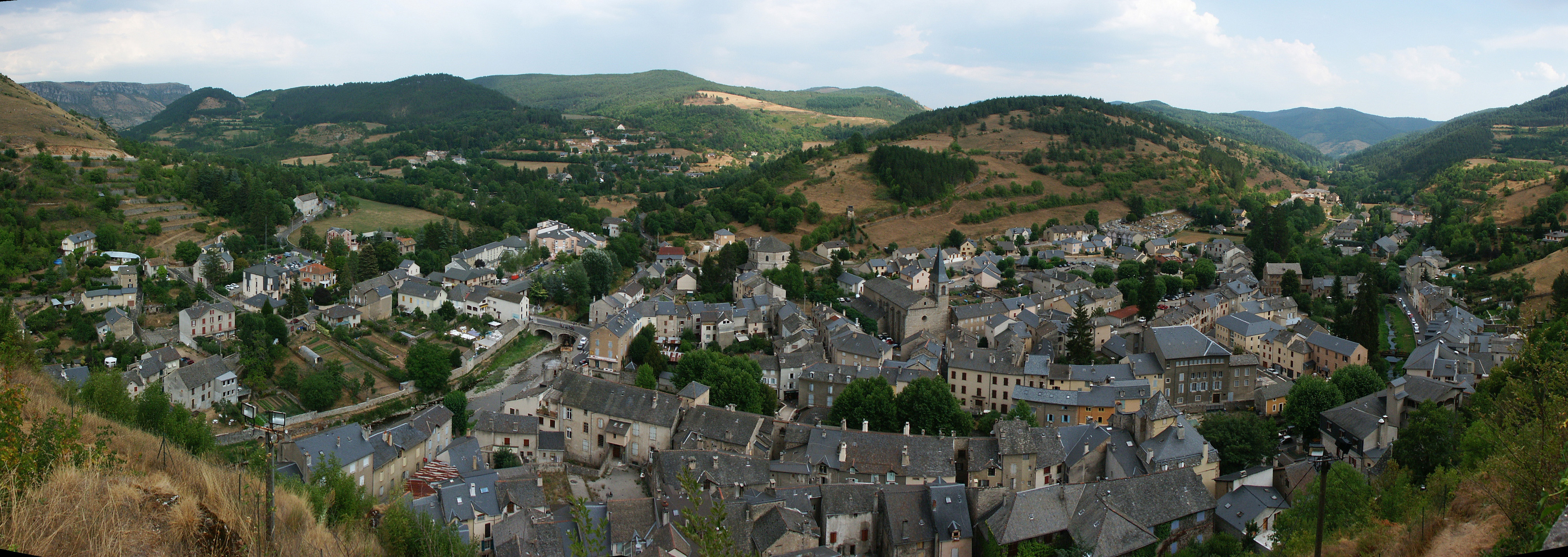 Panorama de la ville de Meyrueis